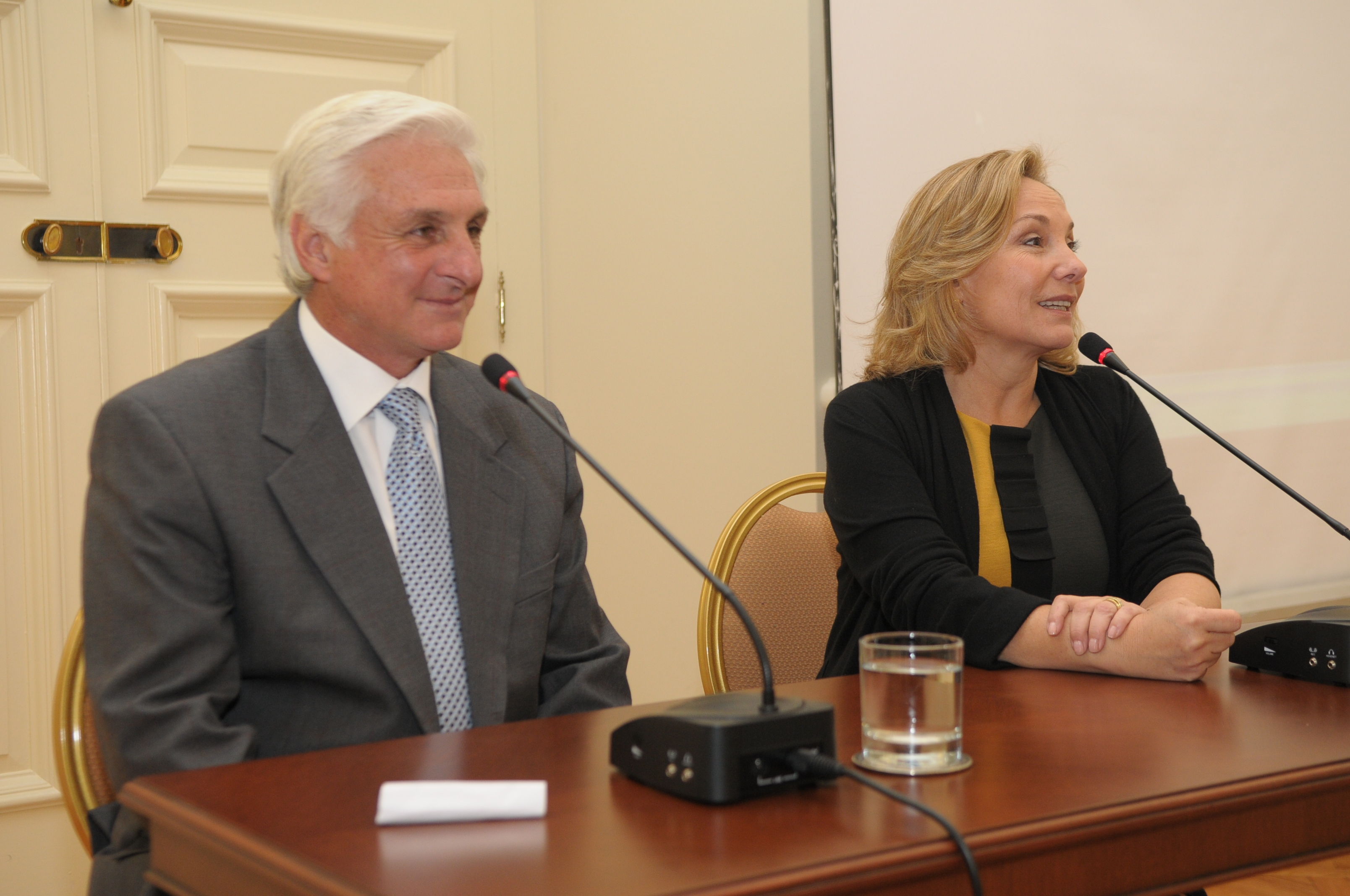 Conferencia Roberto Canessa